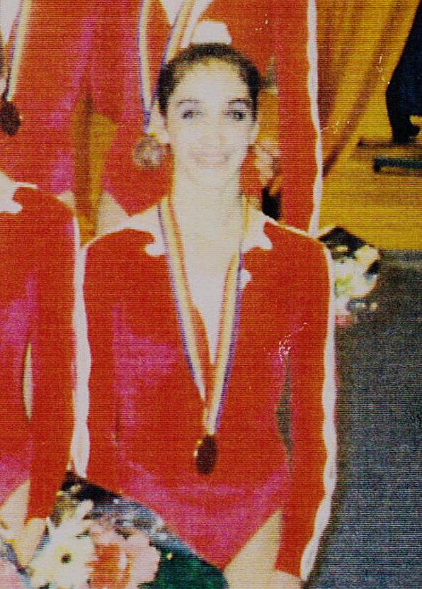 Carolina Borrell con el conjunto español de gimnasia rítmica en el Campeonato Europeo de Bucarest en 1993.